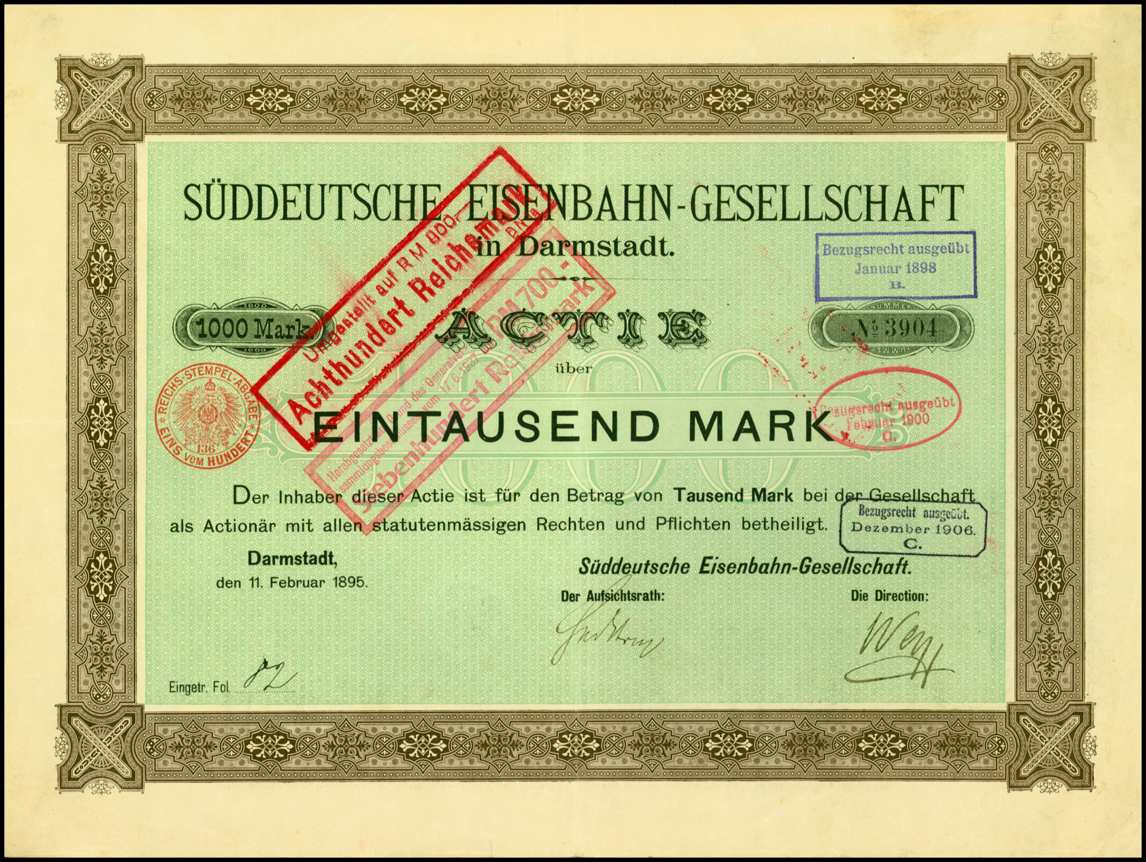 Aktie über 1000 Mark der Süddeutschen Eisenbahn-Gesellschaft in Darmstadt vom 11. Februar 1895; aus dem Fundus des Ersten Deutschen Historic-Actien-Museum e.V. (EDHAM), Kürnbach